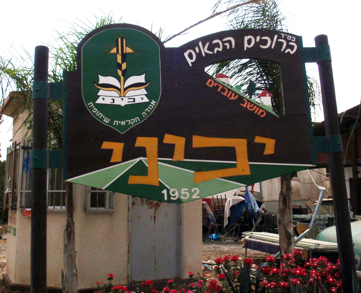 יכיני שלט הכניסה למושב